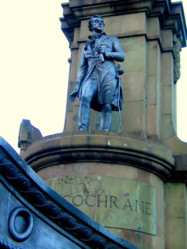 Valparaiso